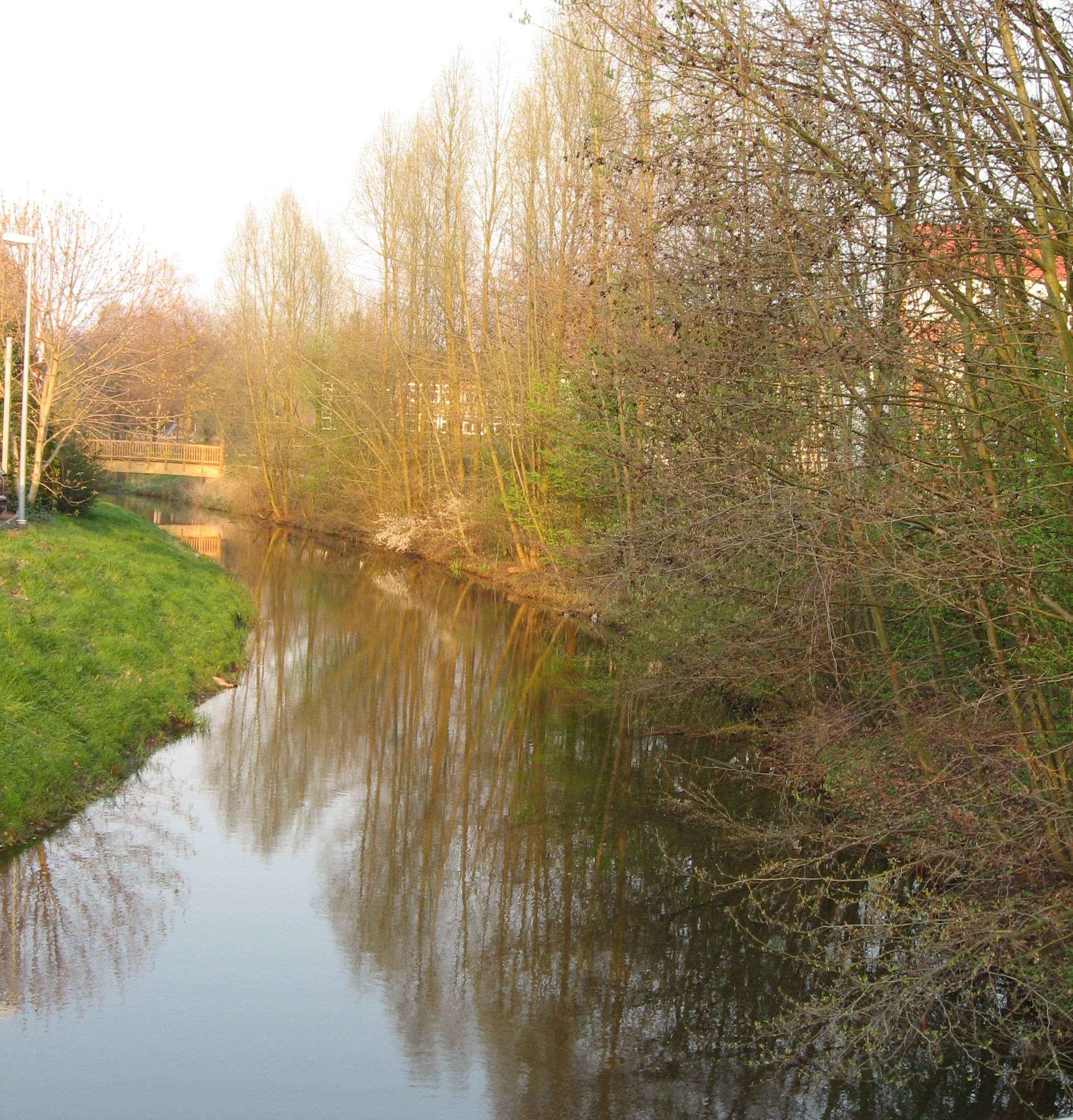 Ladbergen, Zentrum, Mühlenbach